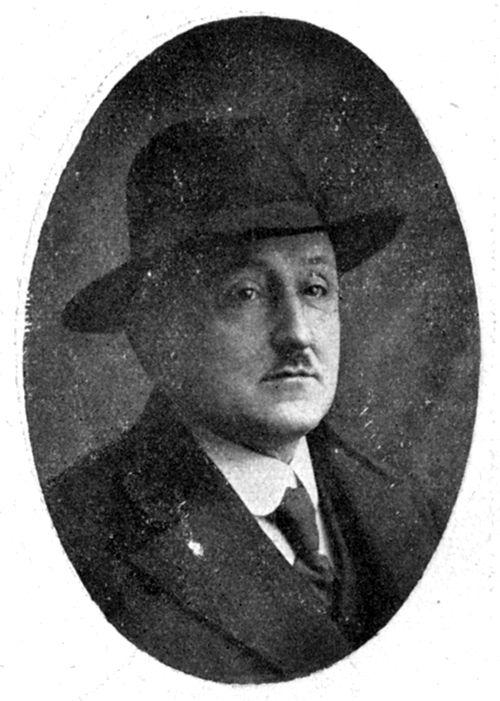 František Josef Čečetka (1871 - 1942), Český spisovatel.